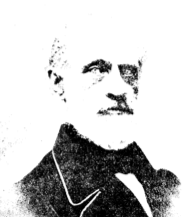 foto Eesti Kirik, 1938 nr.27:6